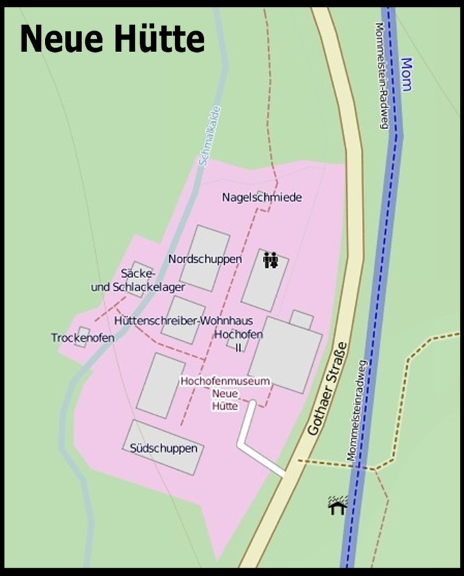 Lageplan des Hochofenmuseums Neue Hütte bei Schmalkalden.